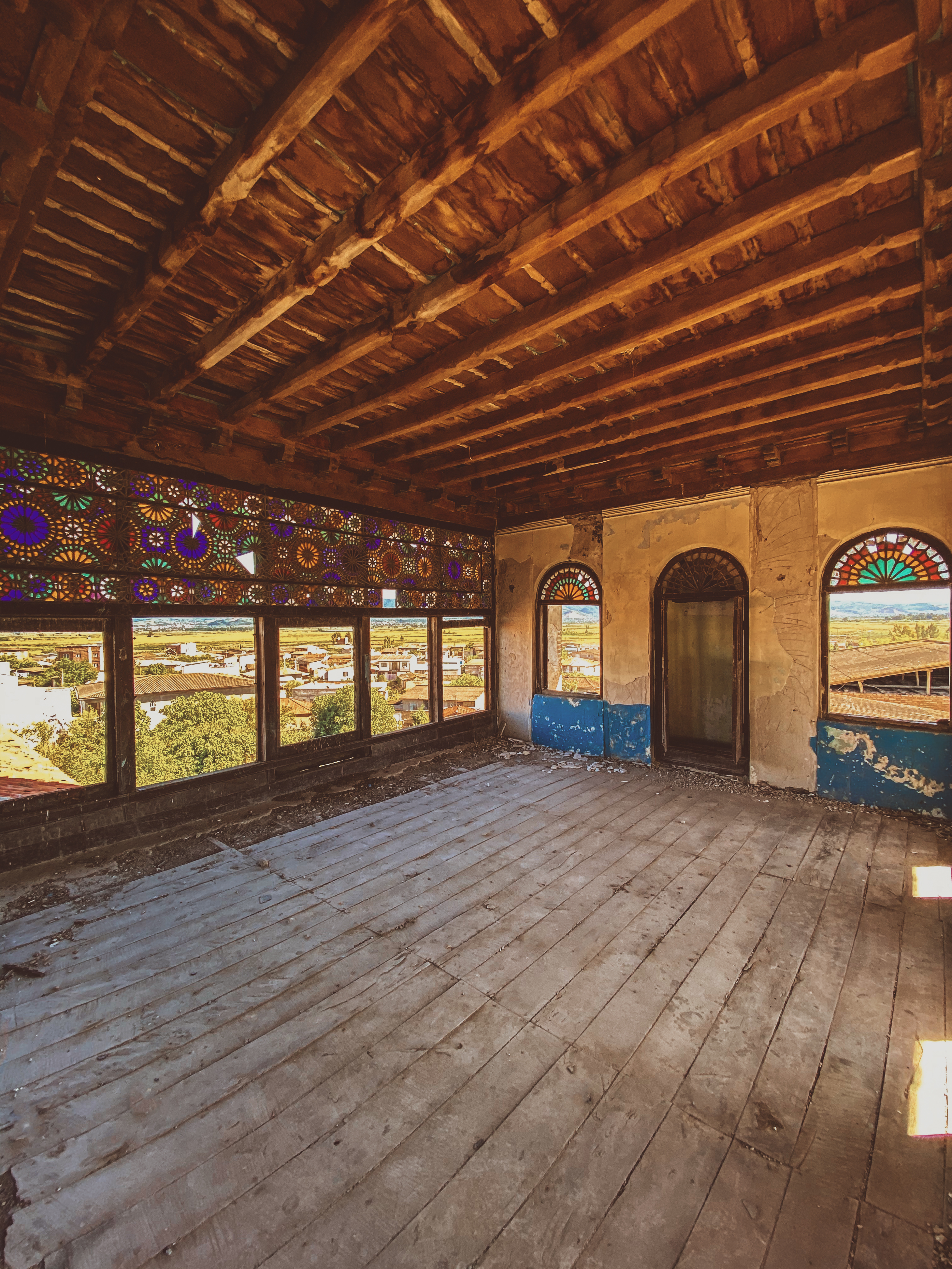 نمایی از داخل طبقه بالا